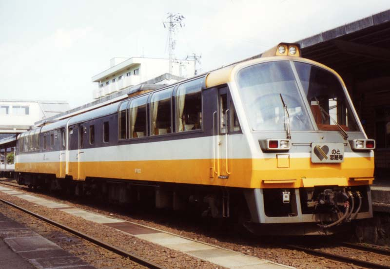 のと鉄道NT800形気動車、穴水にて